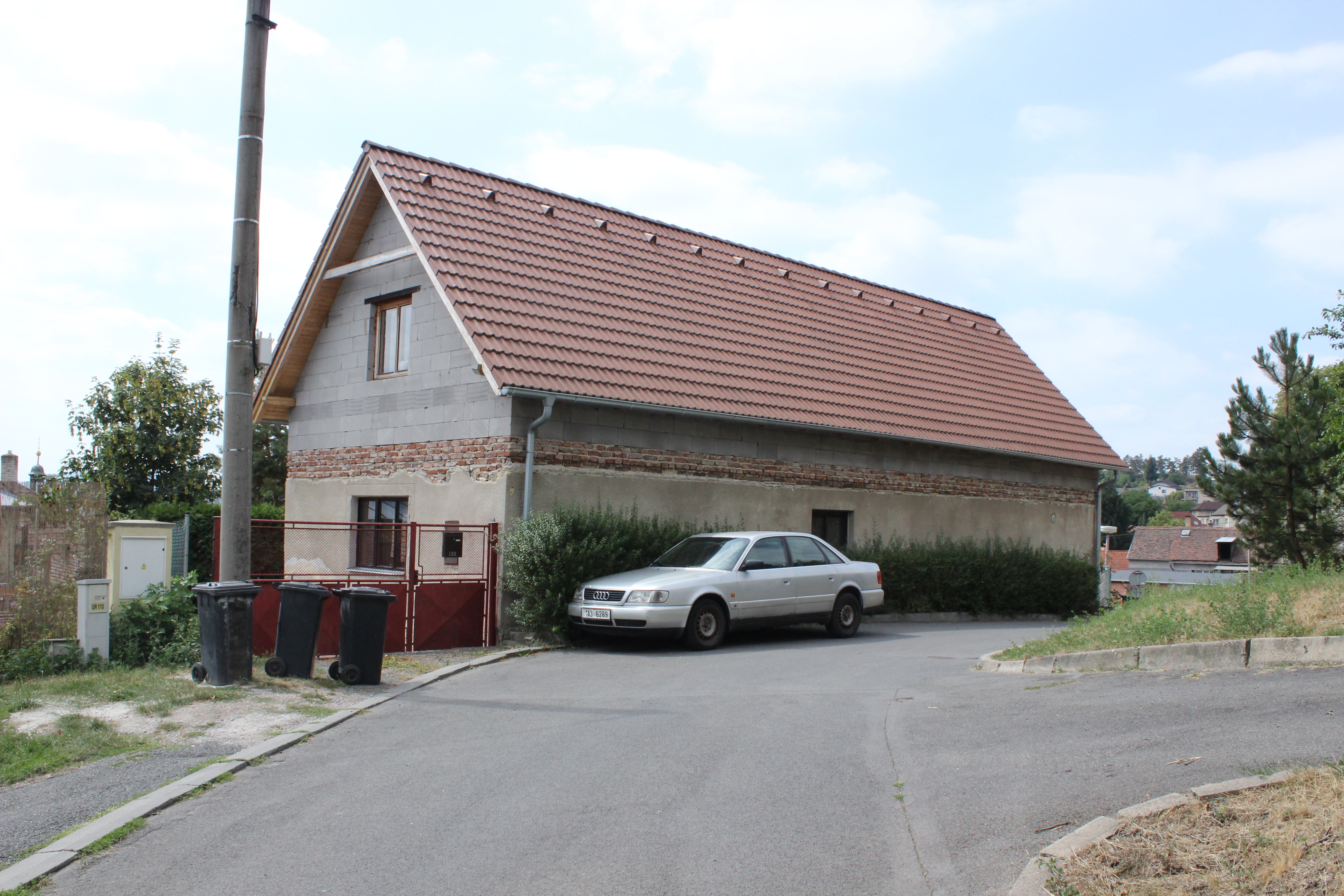 Rodný dům Viléma Kreibicha ve Zdicích, číslo popisné 152.